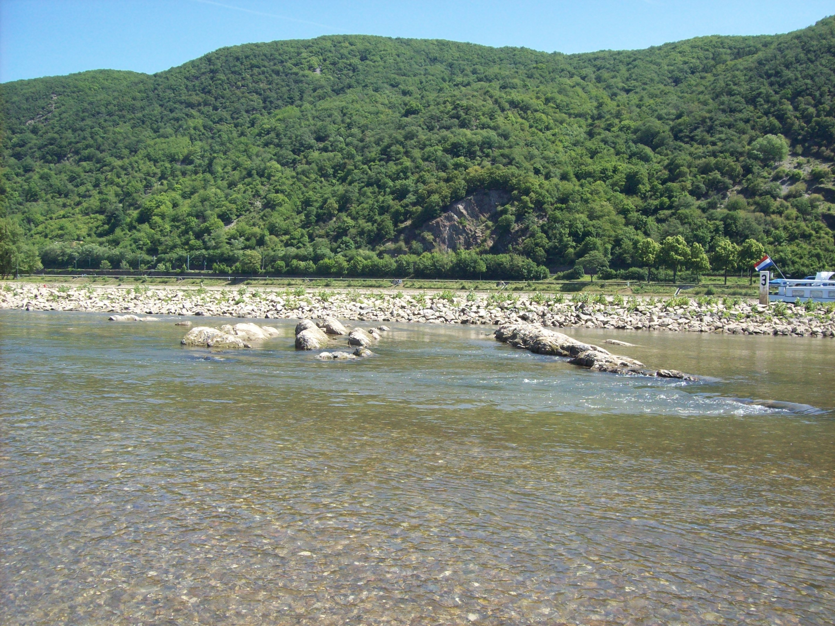 Weinsteiner Leyen.